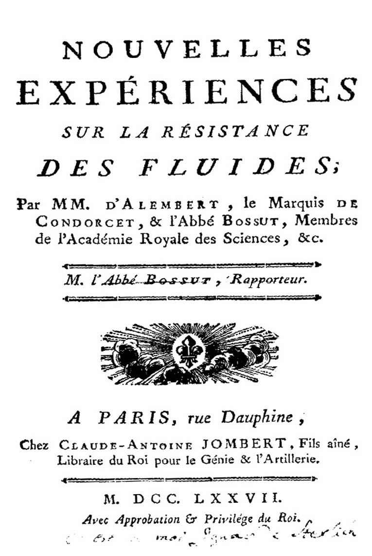 Nouvelles expériences sur la résistance des fluides, par MM. d'Alembert, ... Condorcet & l'Abbé Bossut ... . - A Paris : rue Dauphine, chez Claude-Antoine Jombert, fils aîné, libraire du Roi pour le Génie & l'Artillerie, 1777 (De l'imprimerie de Chardon, rue Galande, 1777). - [4], 232 p., V c. di tav. ripiegate ; 8º .